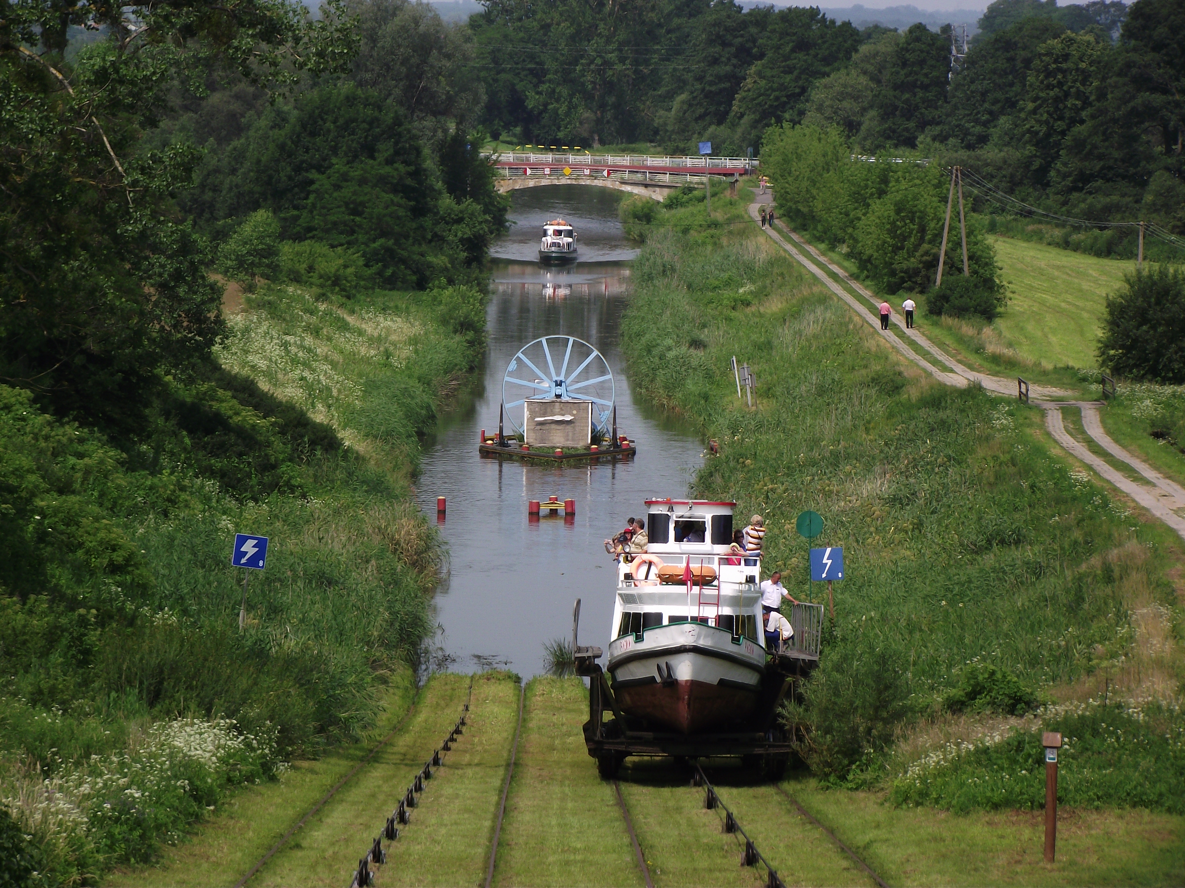 Pochylnia Buczyniec w zespole Kanału Elbląskiego